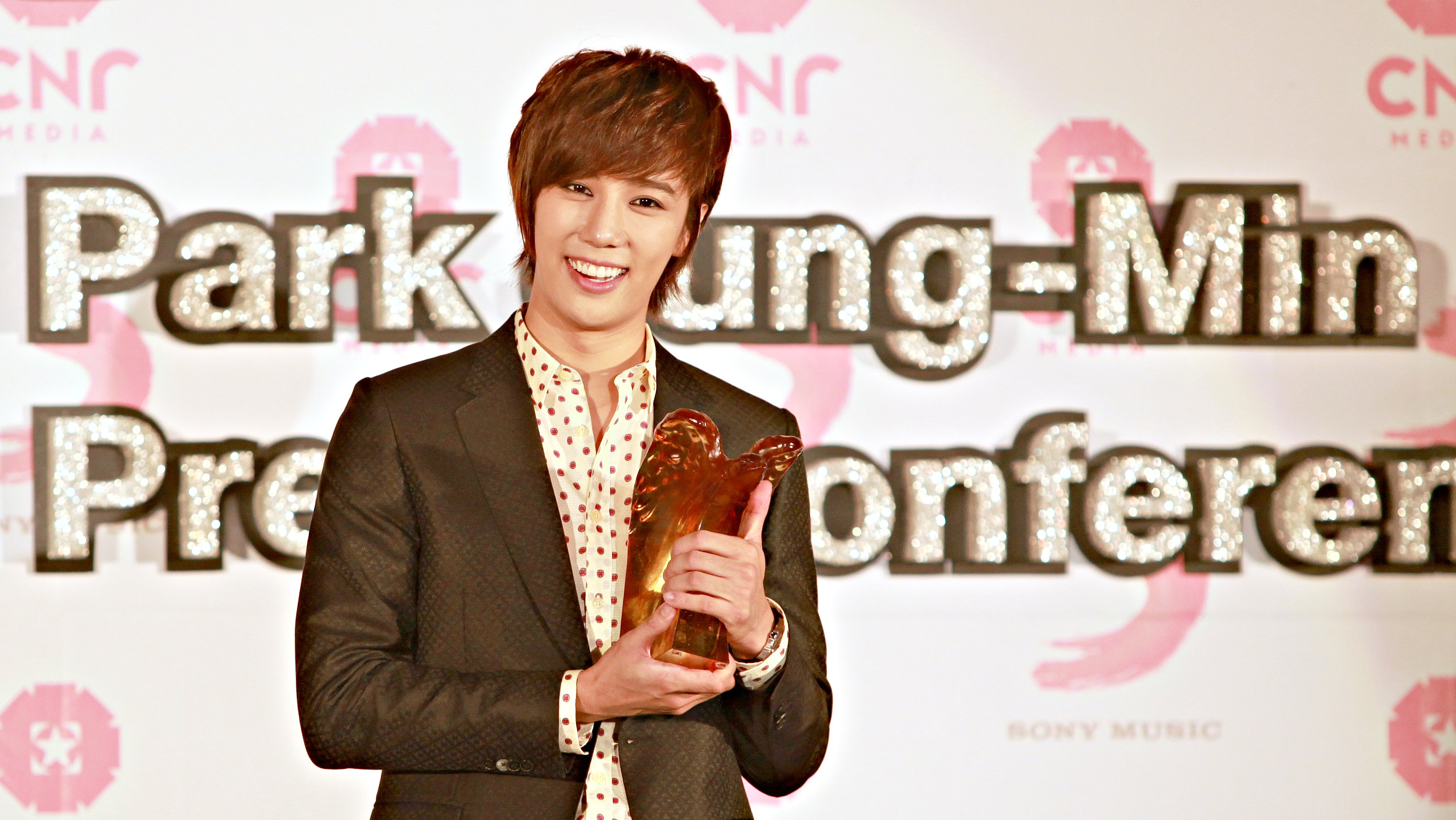 韓星朴政珉今日2010/09/30在台灣正式與索尼音樂簽約NEWS B